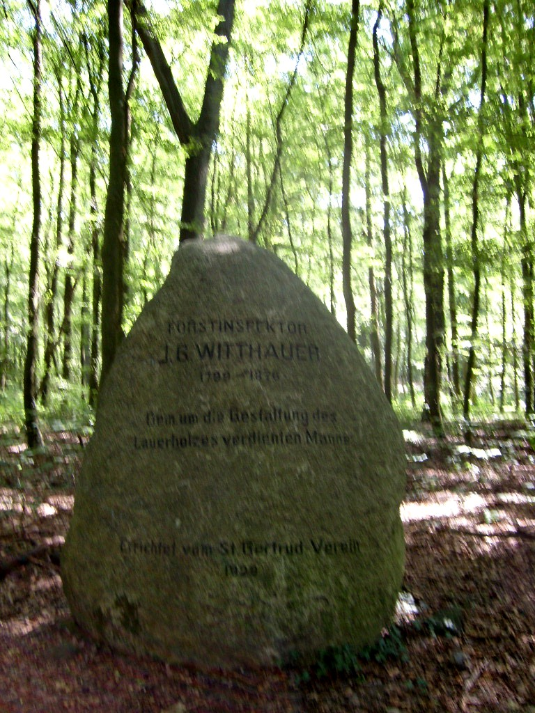 Gedenkstein für den Forstinspektor Johann Georg Witthauer (1799-1876) im Lauerholz